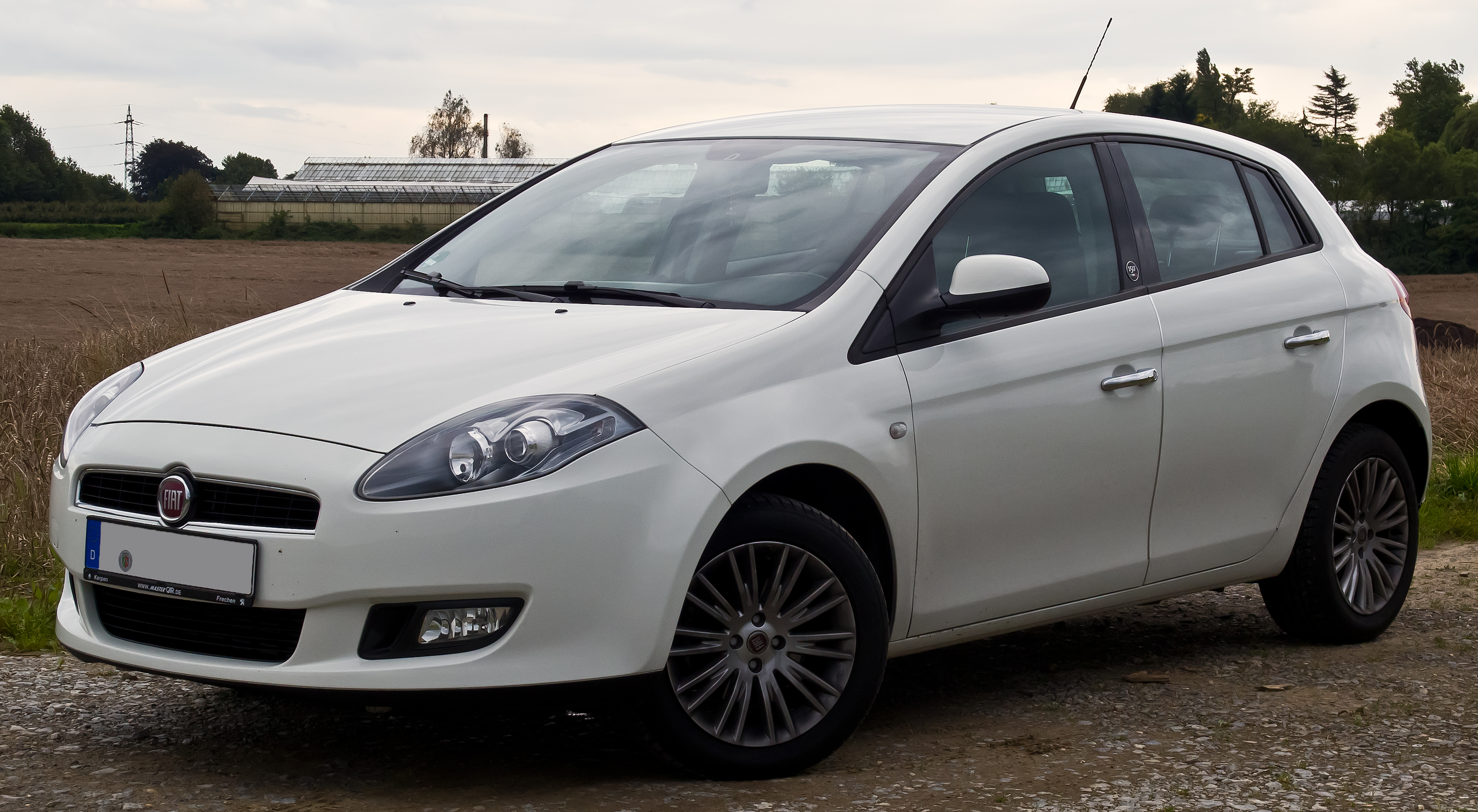 Fiat Bravo 1.6 16V Multijet Dynamic (II)